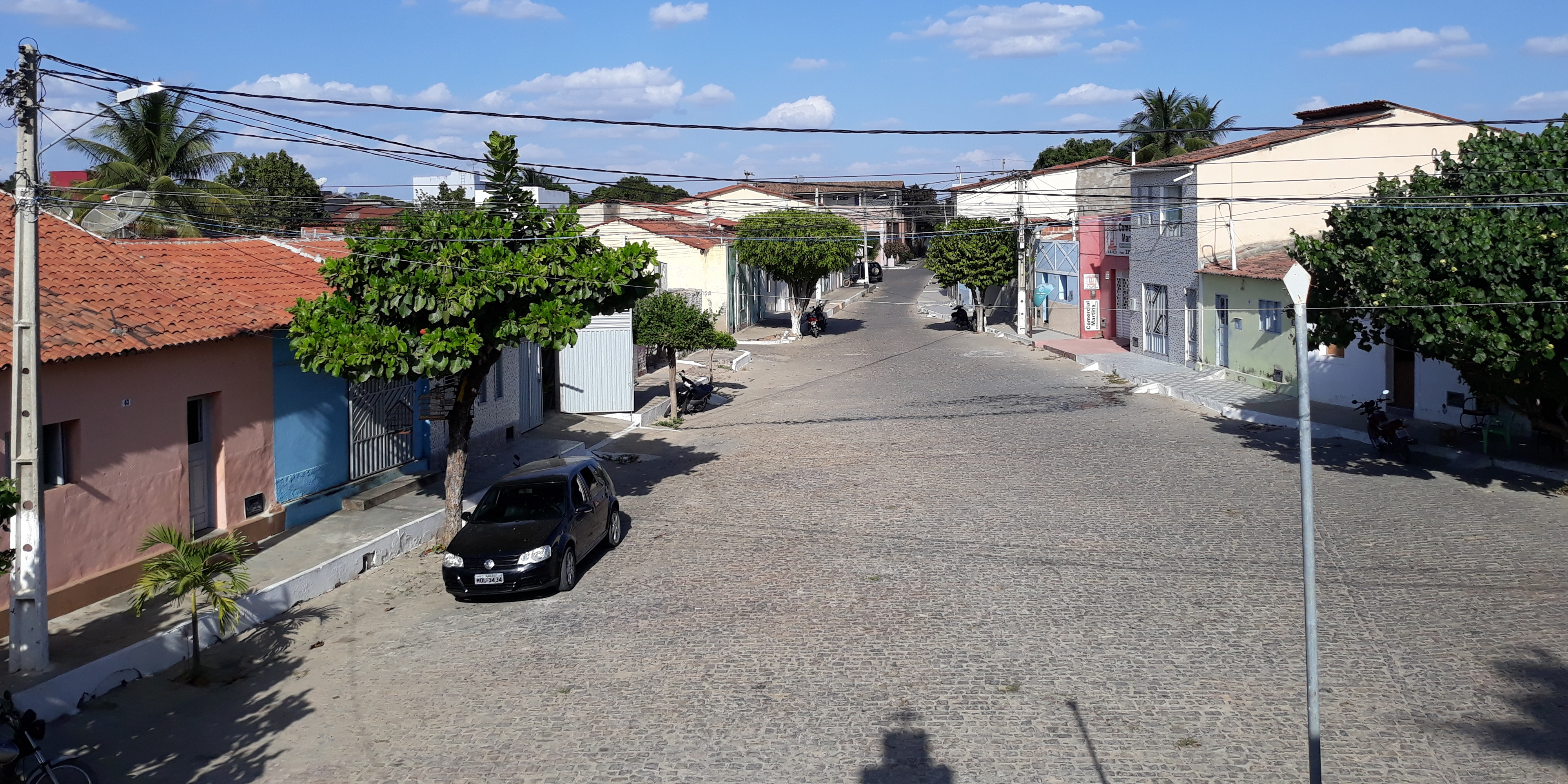 Rua Francisco Martins Roriz, onde nasceu Martins, Rio Grande do Norte (Brasil), e cujo nome faz referência ao fundador da cidade